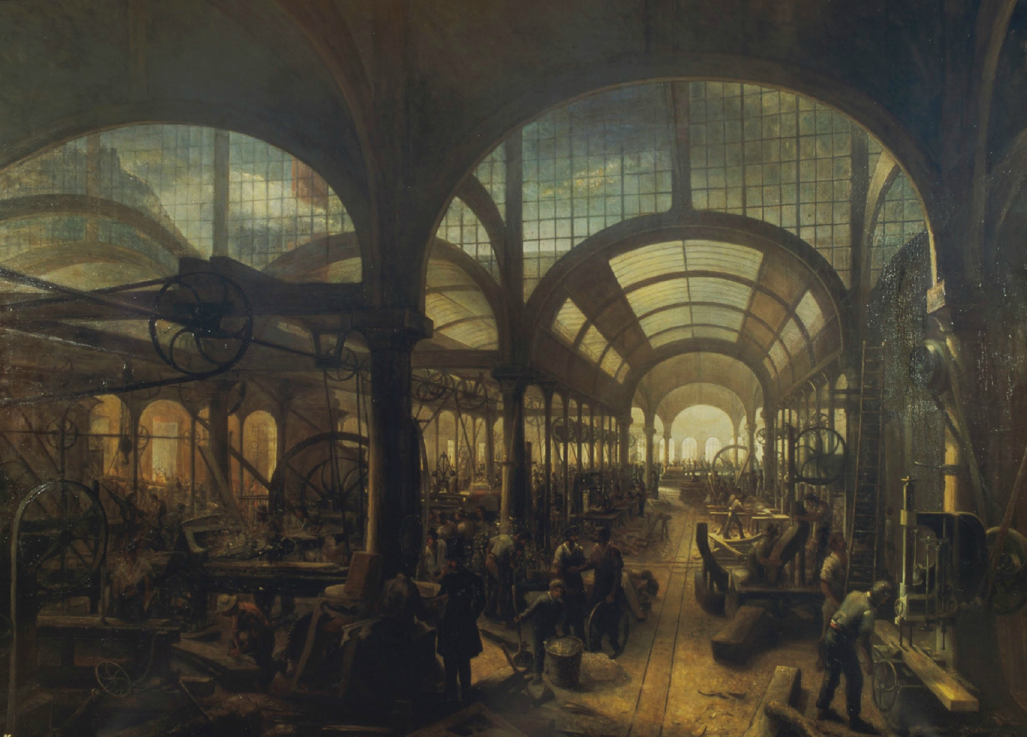 Charles Lepage, Atelier pour le travail mécanique du bois, 1865, Musée des arts et métiers, Paris